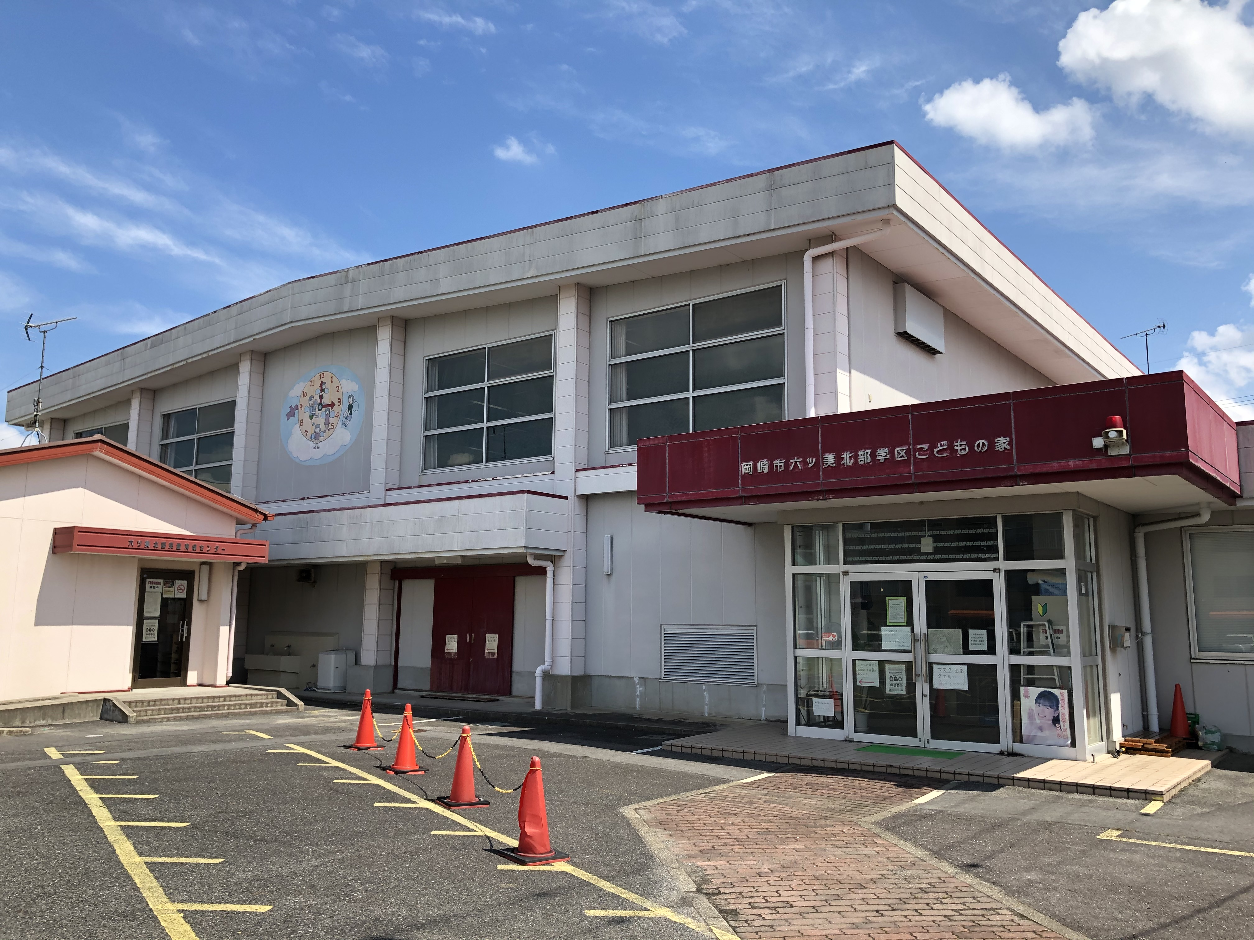 六ツ美北部学区こどもの家（岡崎市井内町）